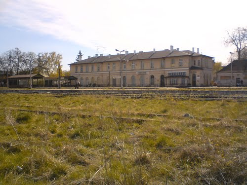 Nieczynna stacja kolejowa w Bartoszycach.